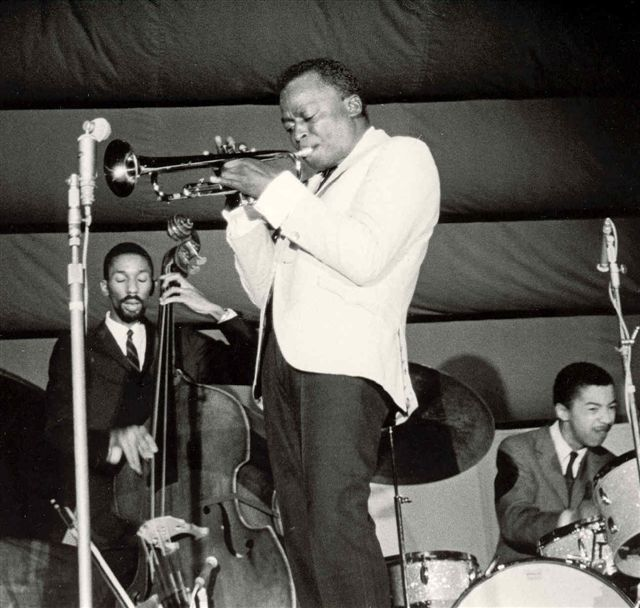 Miles Davis à Antibes dans la nuit du 26 au 27 juillet 1963. À gauche, Ron Carter. À droite, Tony Williams